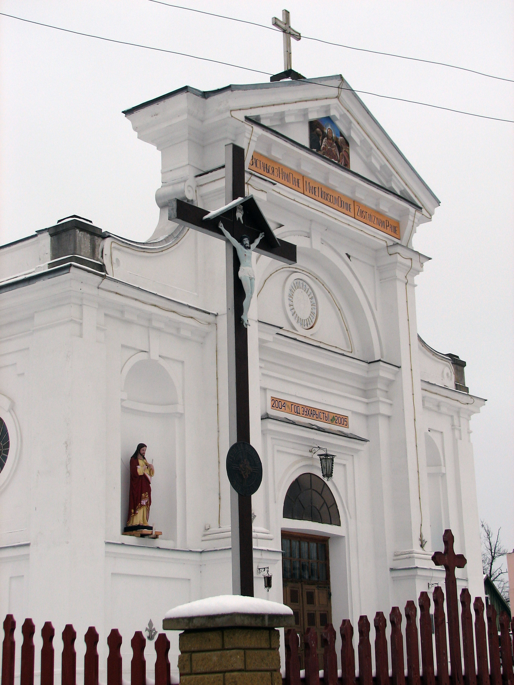 Беларуская (тарашкевіца): Касьцёл Унебаўзяцьця Найсьвяцейшай Панны Марыі (Пружаны)